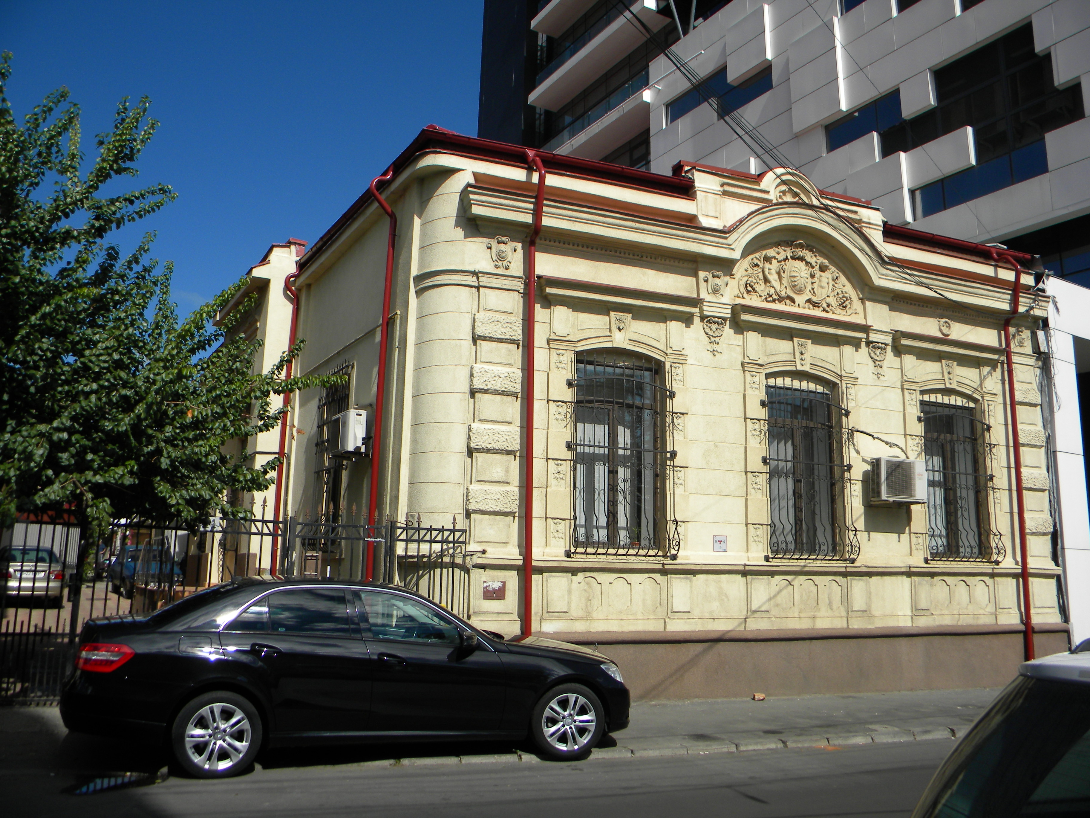 Bucuresti, Romania, Casa pe Str. C.F.Robescu nr. 21, sect. 3